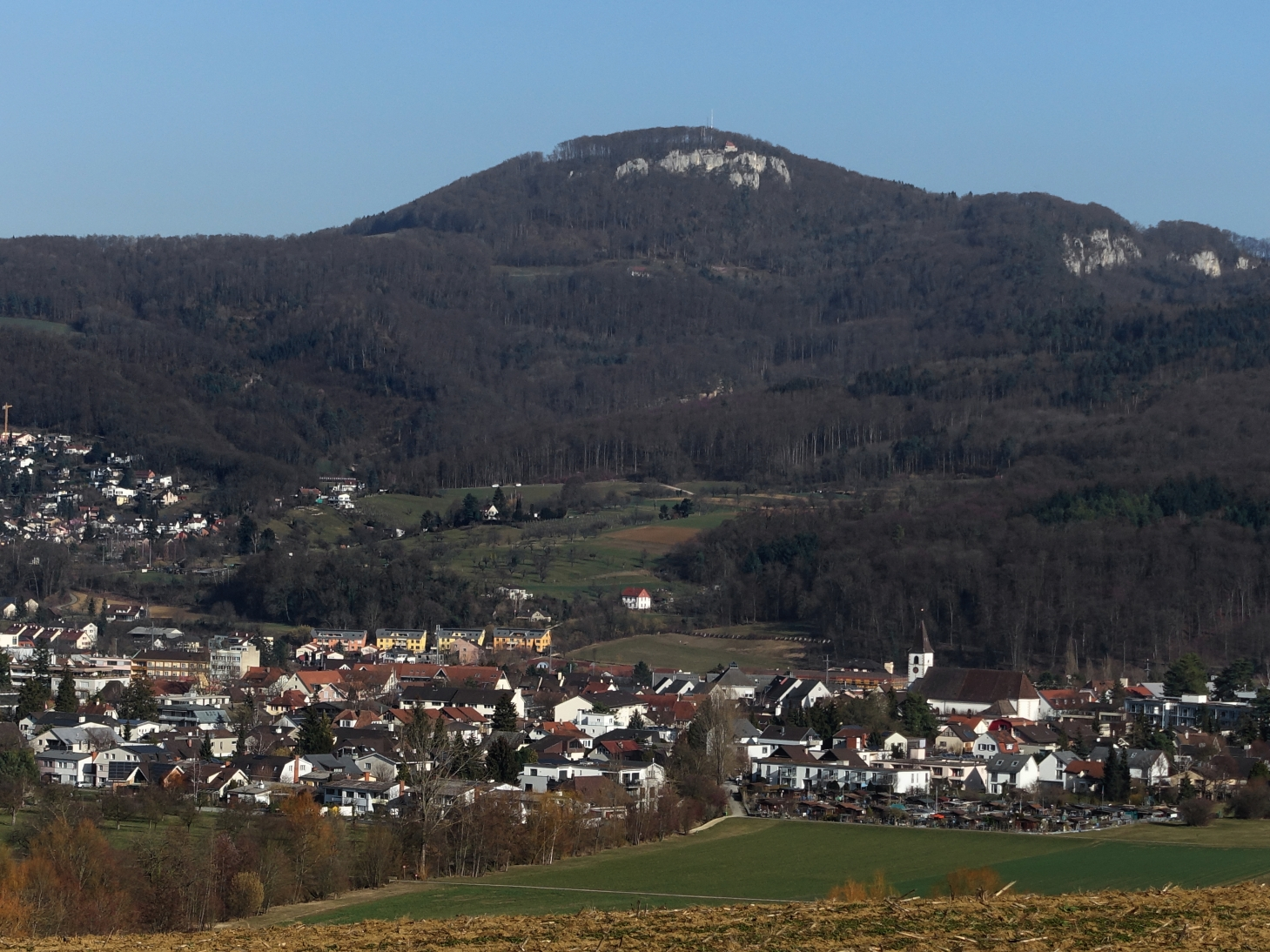 Panorama, Birstal, Aesch, Gempen